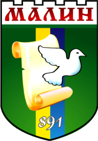 герб м. Малин